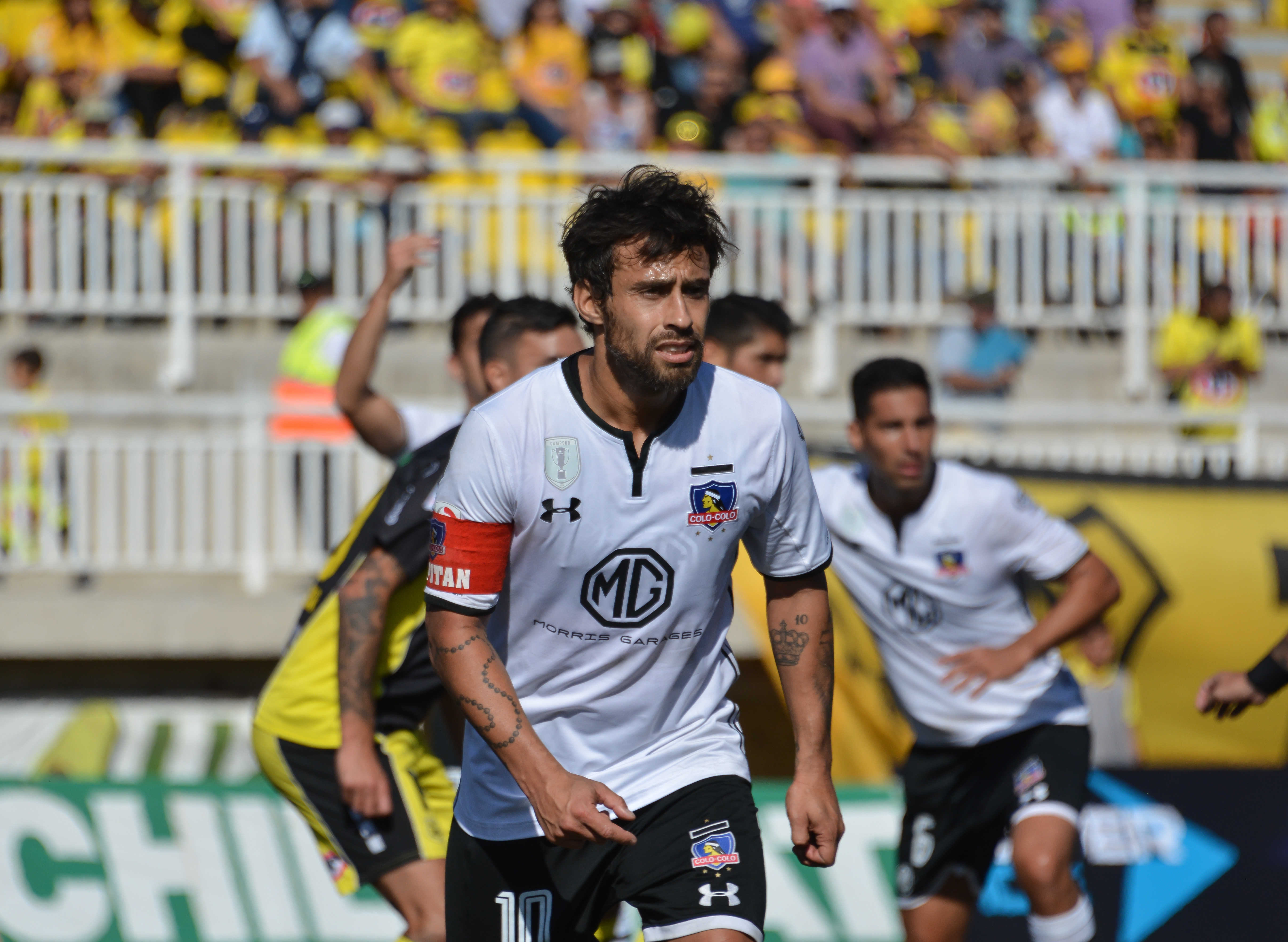 San Luis v Colo-Colo, Estadio Municipal Lucio Fariña Fernández, Quillota, Chile.